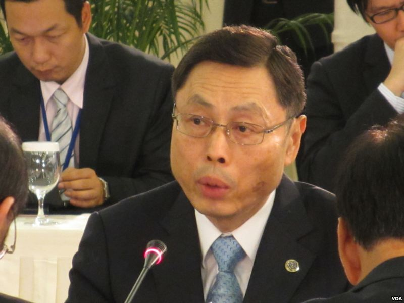 Kao Koong-lian 台湾海基会副董事长高孔廉